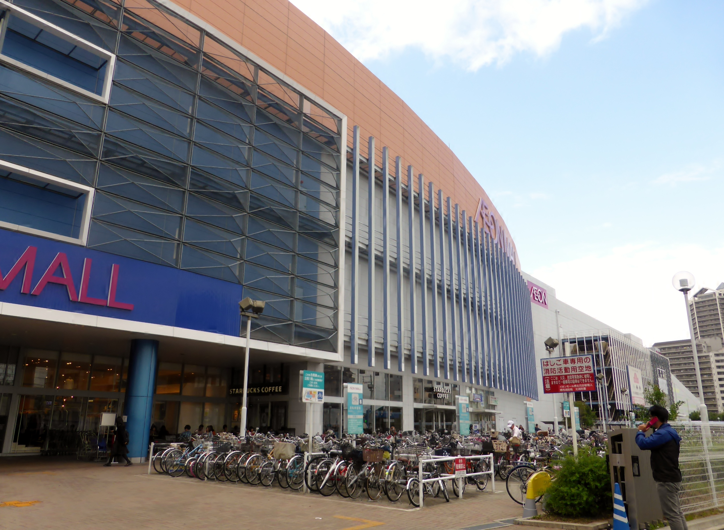 イオンモール堺北花田を撮影